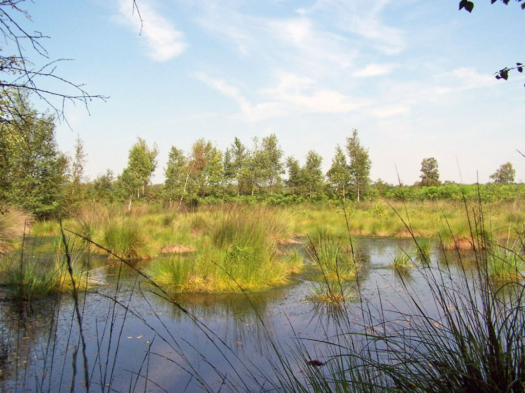 Veen in Twente, het Aamsveen bij Enschede.